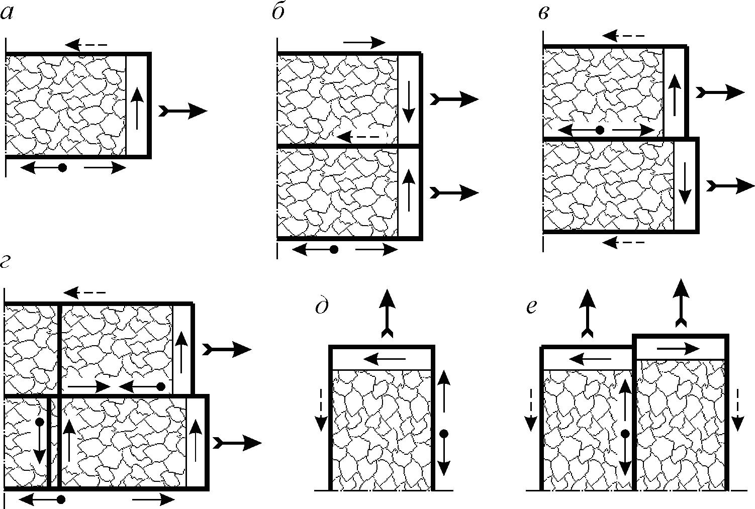 Фото